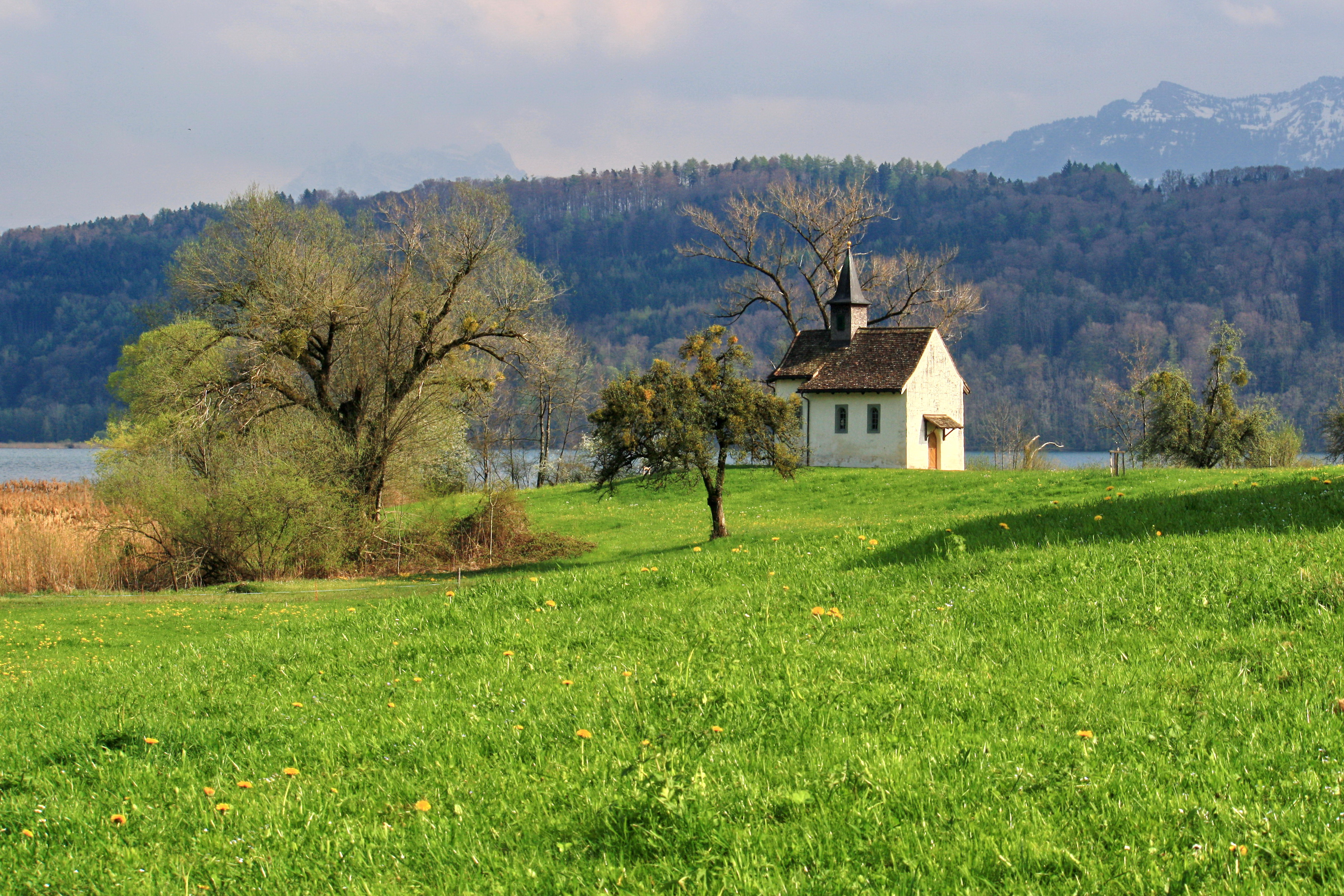 St. Meinrad Kapelle in Bollingen on Obersee (upper Lake Zürich) shore